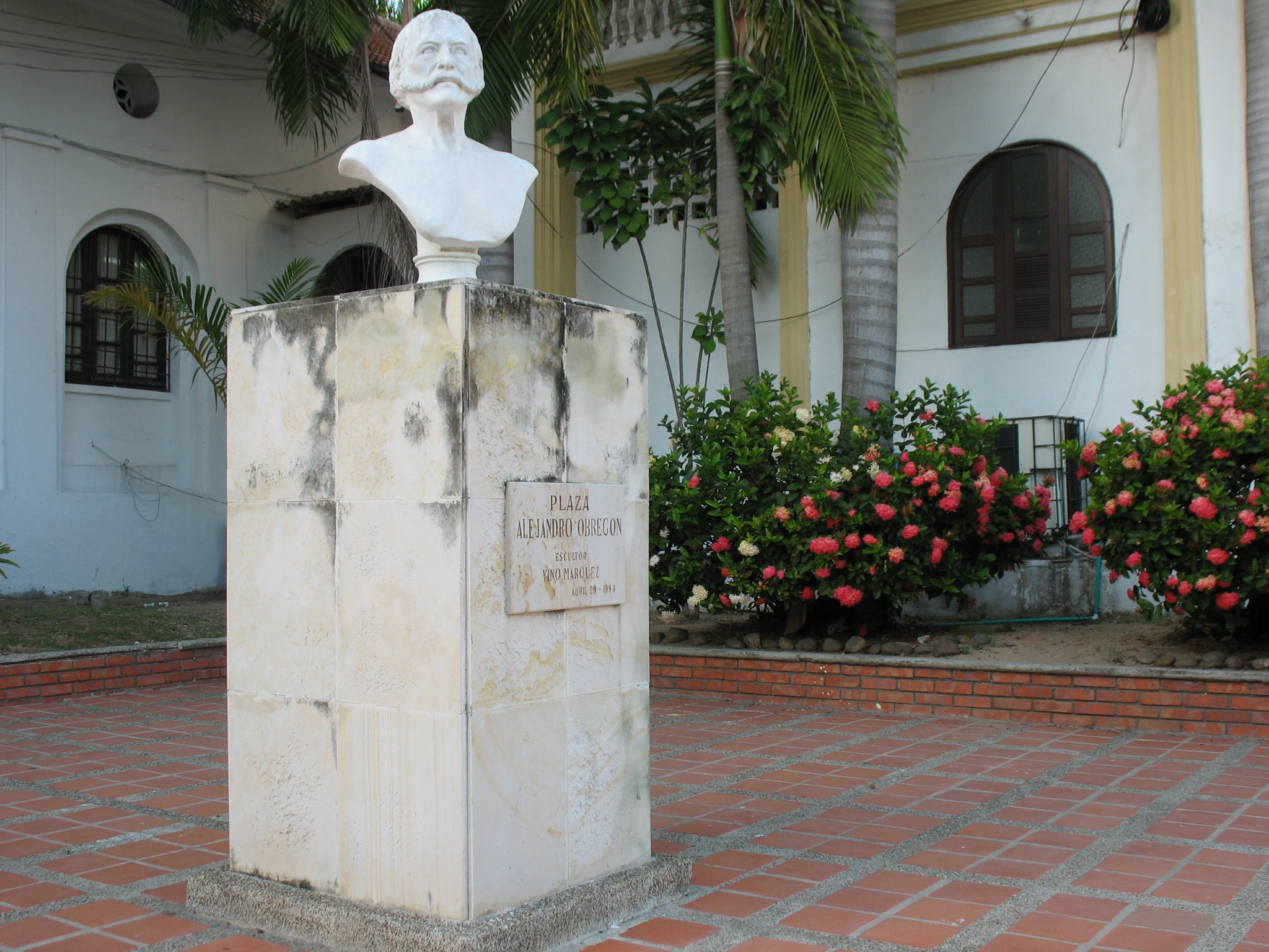 Busto de Alejandro Obregón en Barranquilla